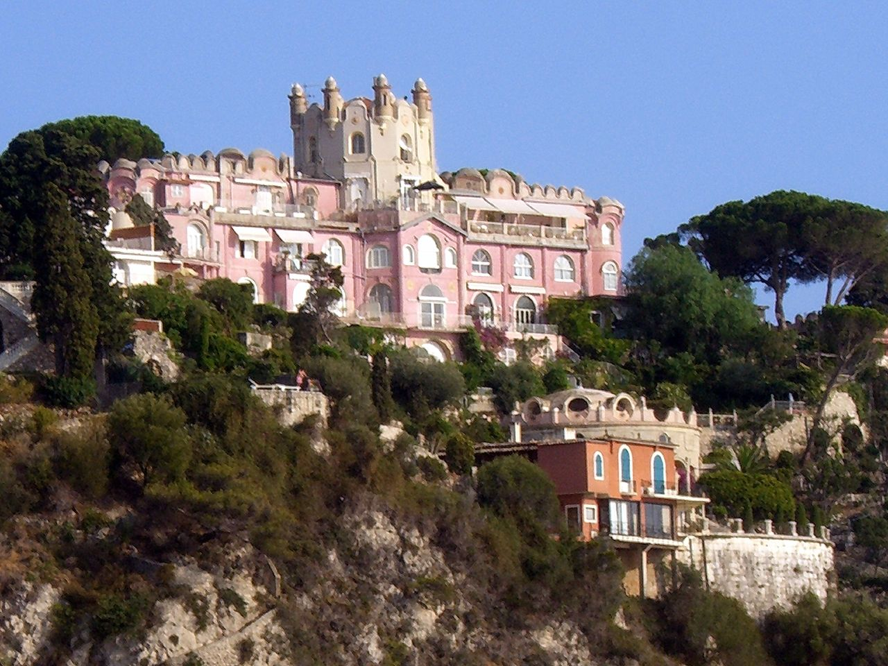 Le château de l'anglaisnice